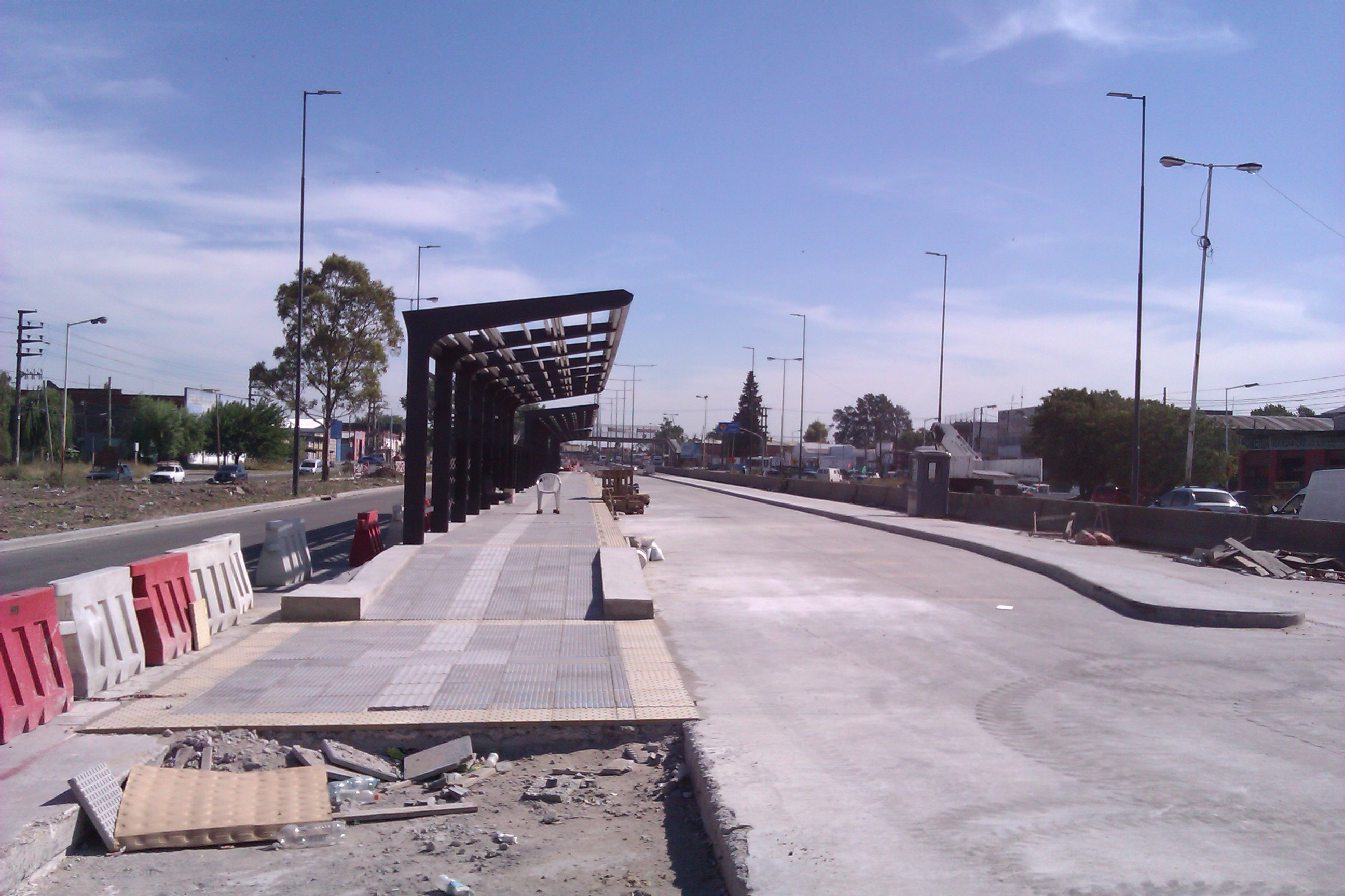 Ruta nacional 3 (Juan Manuel de Rosas) y calle Leonardo Da Vinci, Gregorio de Laferrere. Se pueden observar las obras de lo que será una estación del Metrobús Matanza.